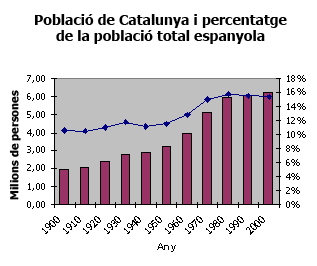 Befolkningsutvecklingen i Katalonien 1900–2000.